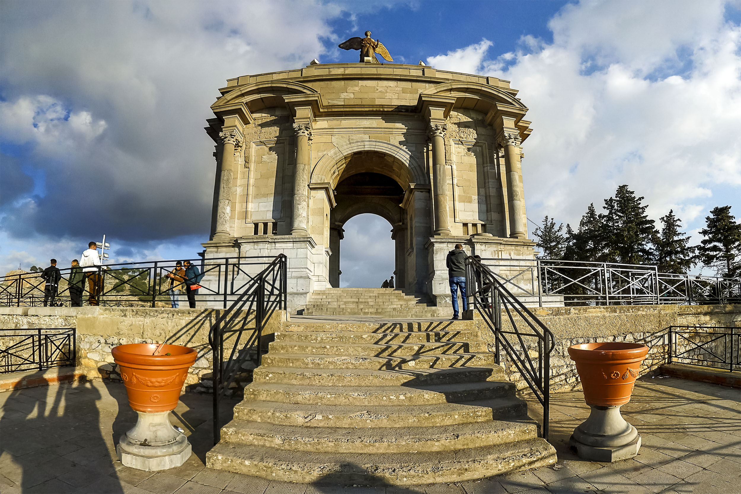 Monument aux morts - Constantine معلم تذكاري - قسنطينة Wilaya de Constantine ولاية قسنطينة